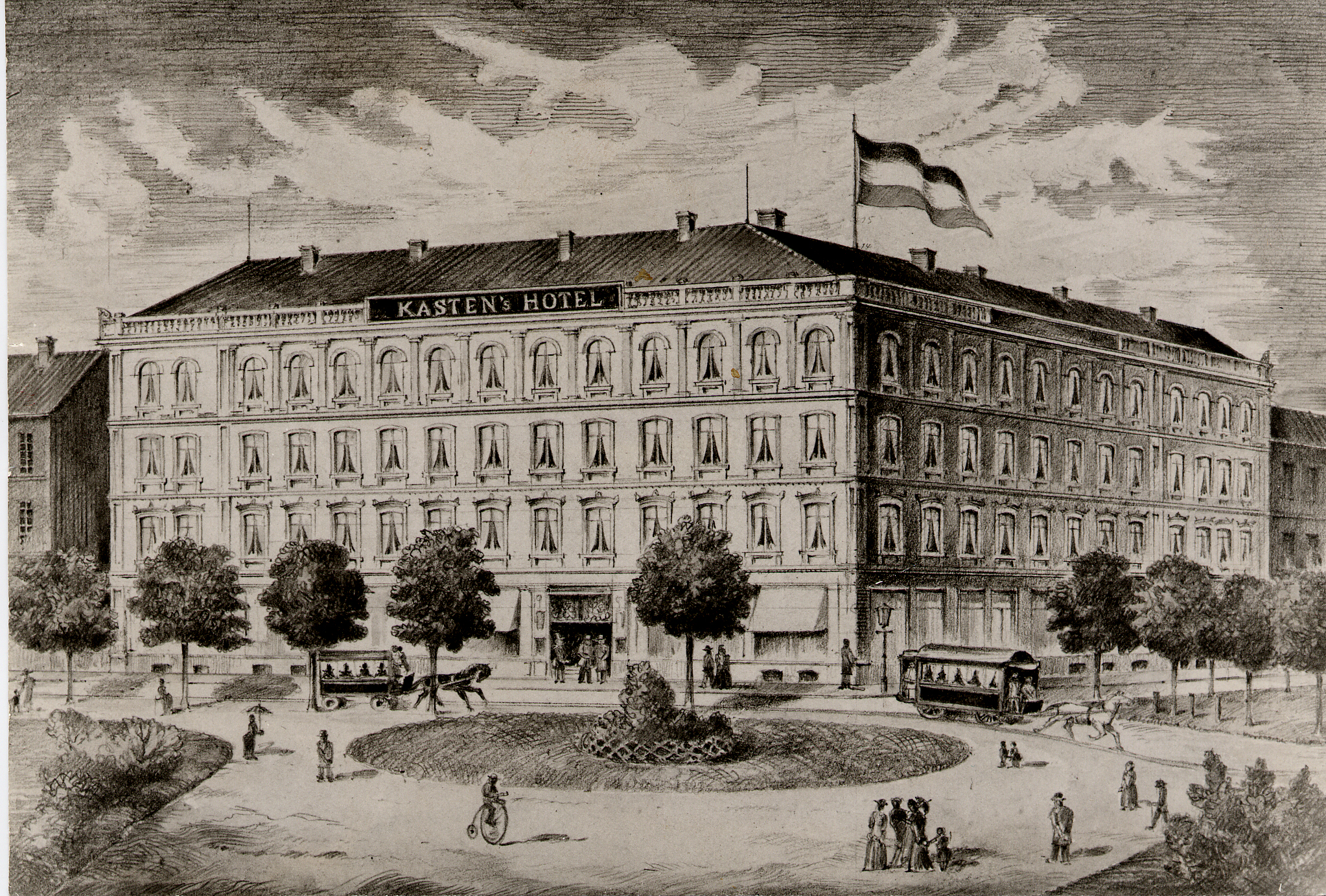 Die Hotelfassade des Kastens Hotel Luisenhof aus dem Jahr 1856.